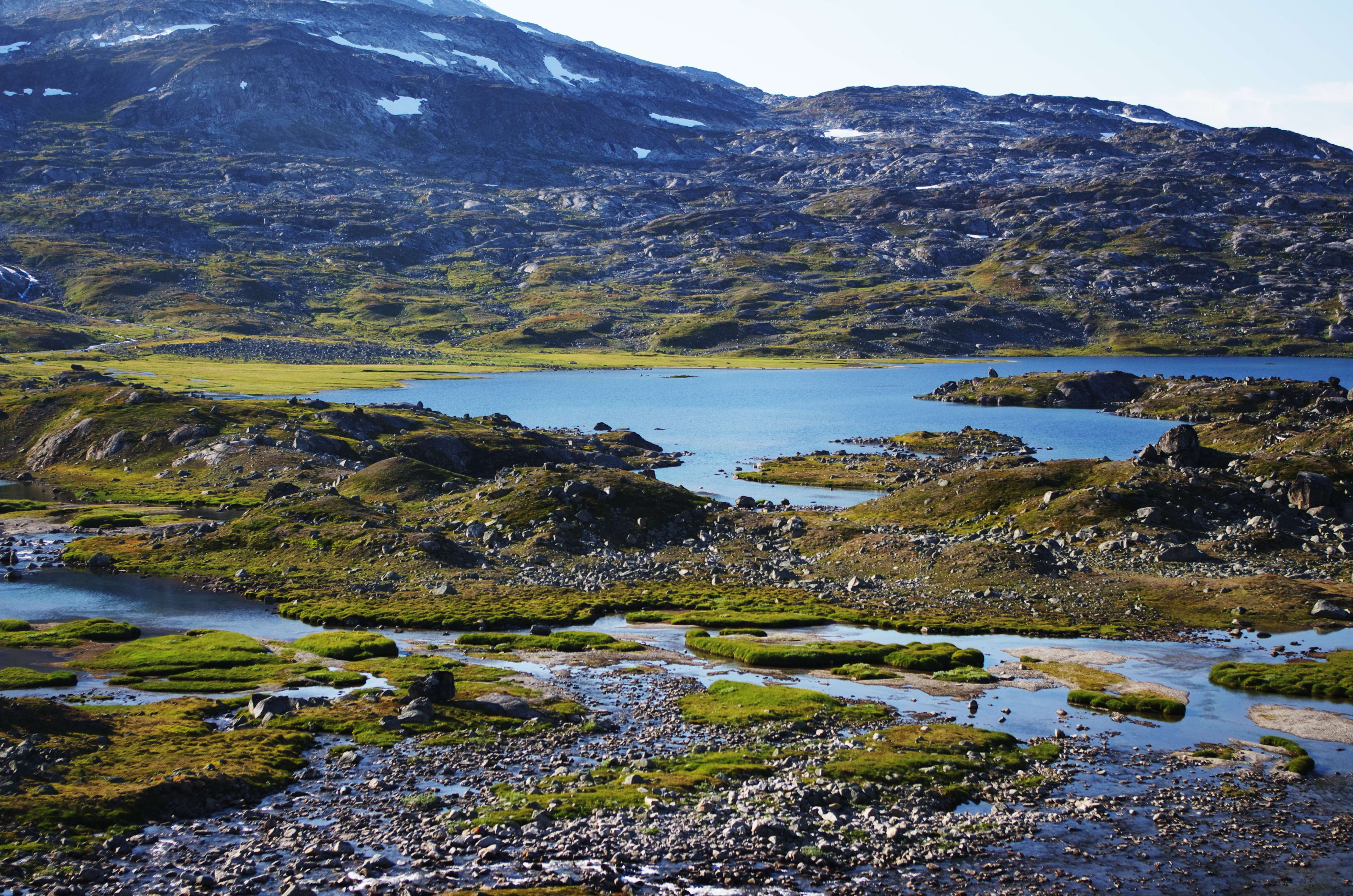 Tåssakenpadajaure (Dossagemjávri) är en sjö i Kiruna kommun i Lappland.